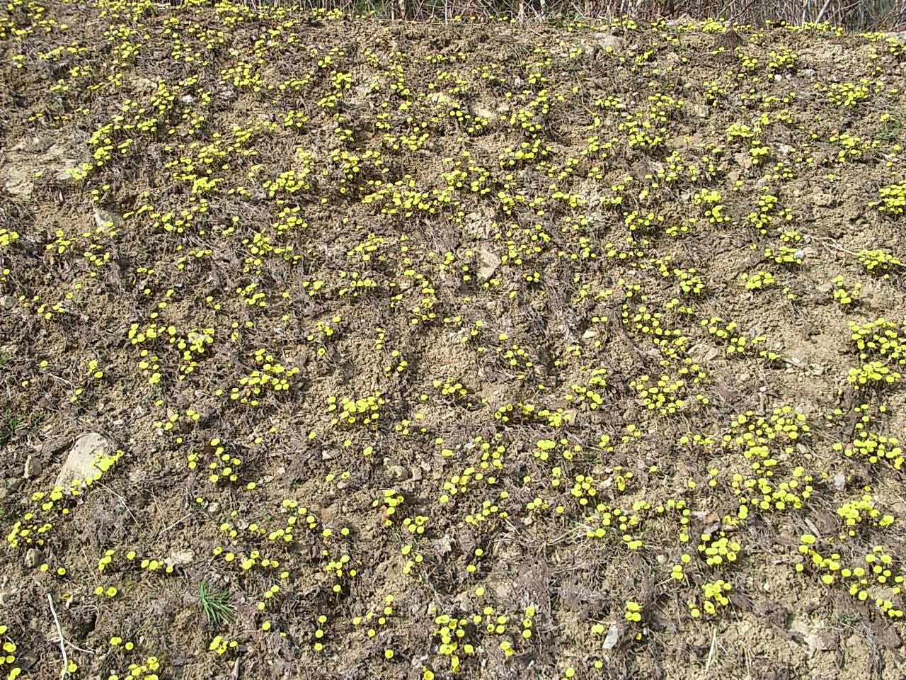 Huflattichflur bei Rabenstein, Stadt Zwiesel, Bayerischer Wald